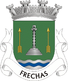 o brasão de frechas